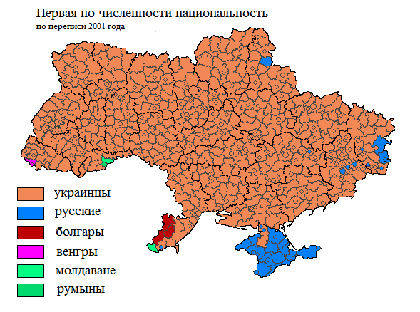 Наиболее многочисленная национальность по данным переписи 2001 года